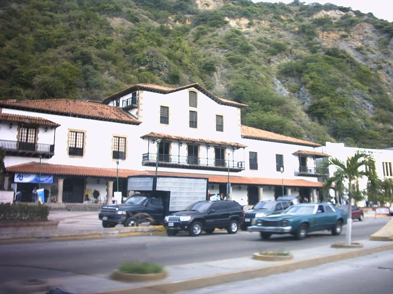 Guipuzcoana house